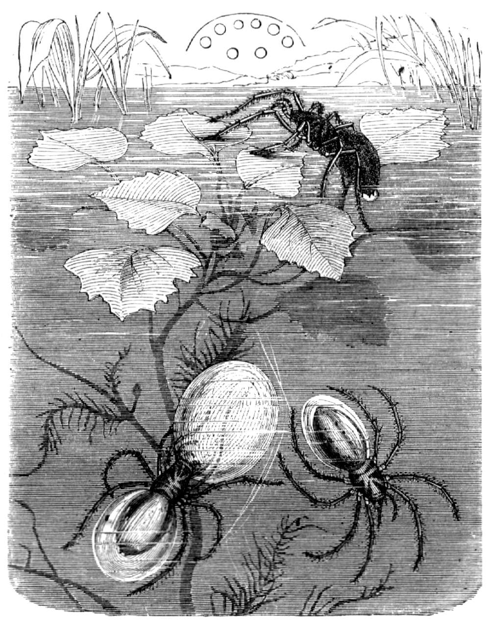 Gemeine Wasserspinne (Argyroneta aquatica), etwas vergrößert, und ein unten offenes Nest derselben. Oben die Augenstellung, von hinten her gesehen. Die Abbildung wurde auch in der Zeitschrift "Deutsche Jugend", Bd. 2, 1873, S. 81, veröffentlicht.